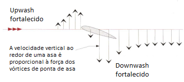 Upwash fortalecido